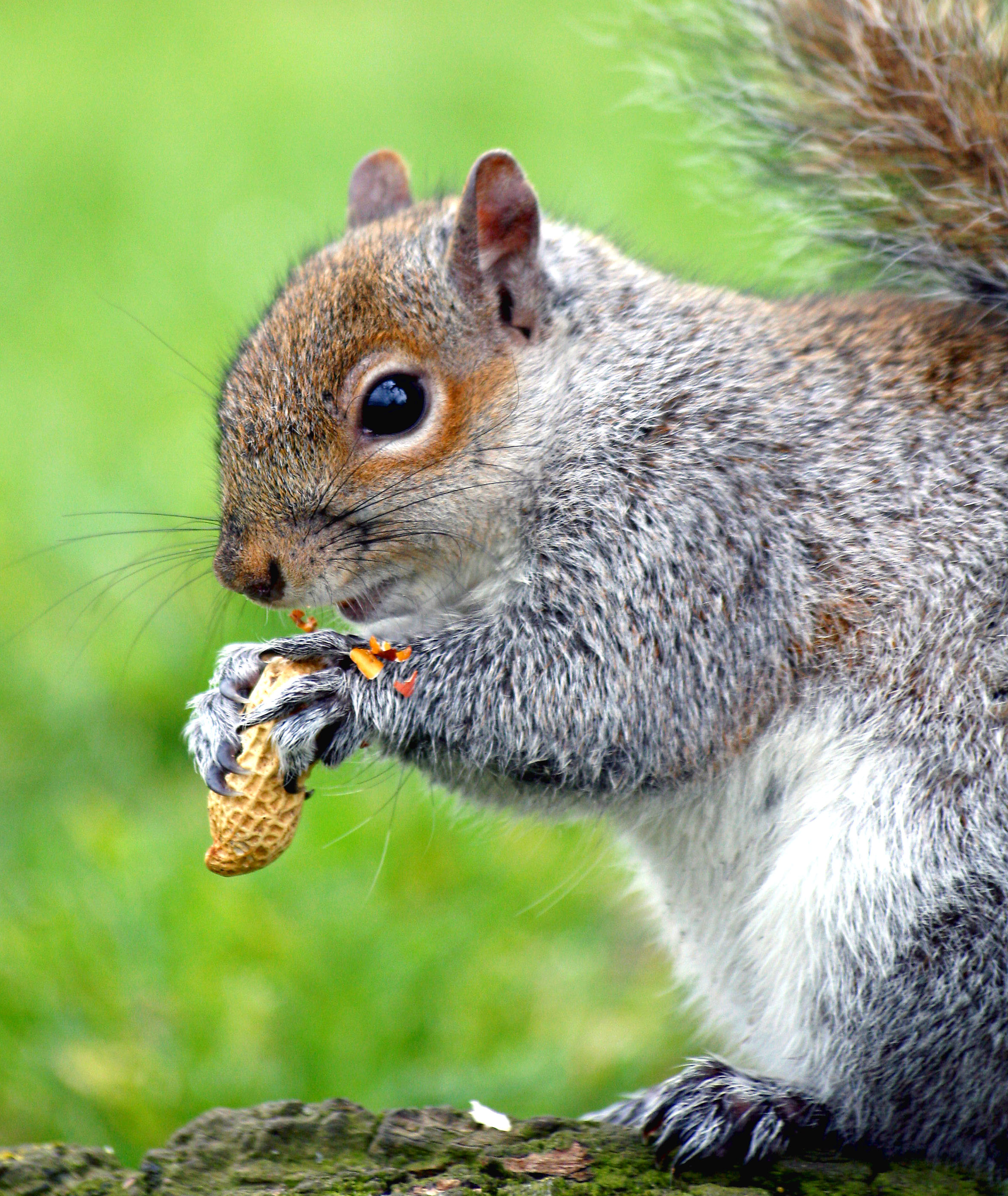 Squirrel - Kensington Palace Gardens, London